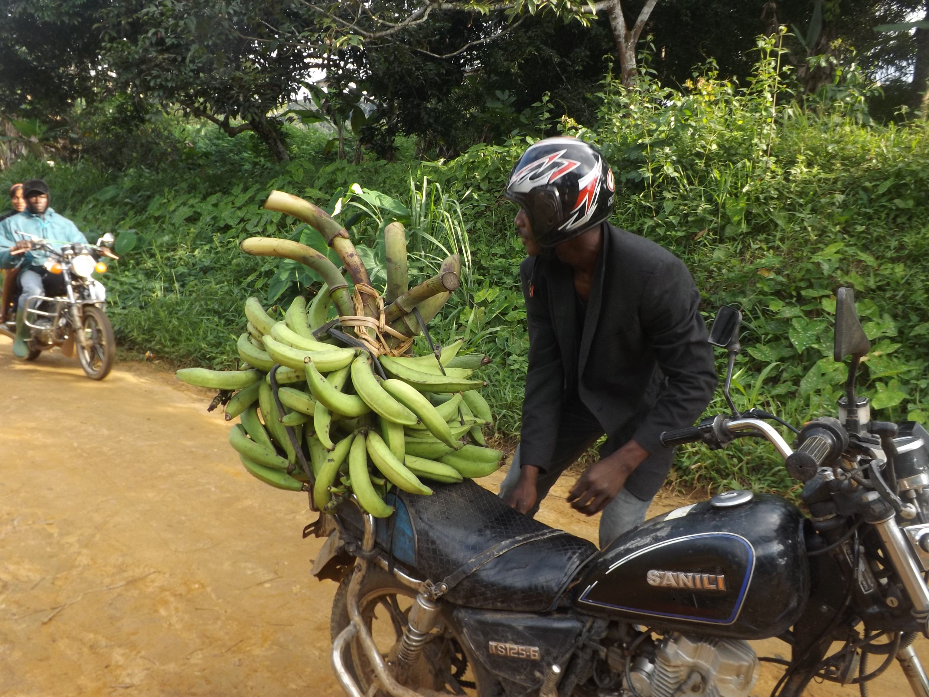 Transport de bananes à moto près de Tayap (Cameroun).